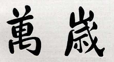 Данное изображение было использовано в статье «Бандзай» опубликованной в четвёртом томе «Военной энциклопедии», который был издан книгоиздательским товариществом Ивана Дмитриевича Сытина в 1911 году в столице Российской империи городе Санкт-Петербурге.